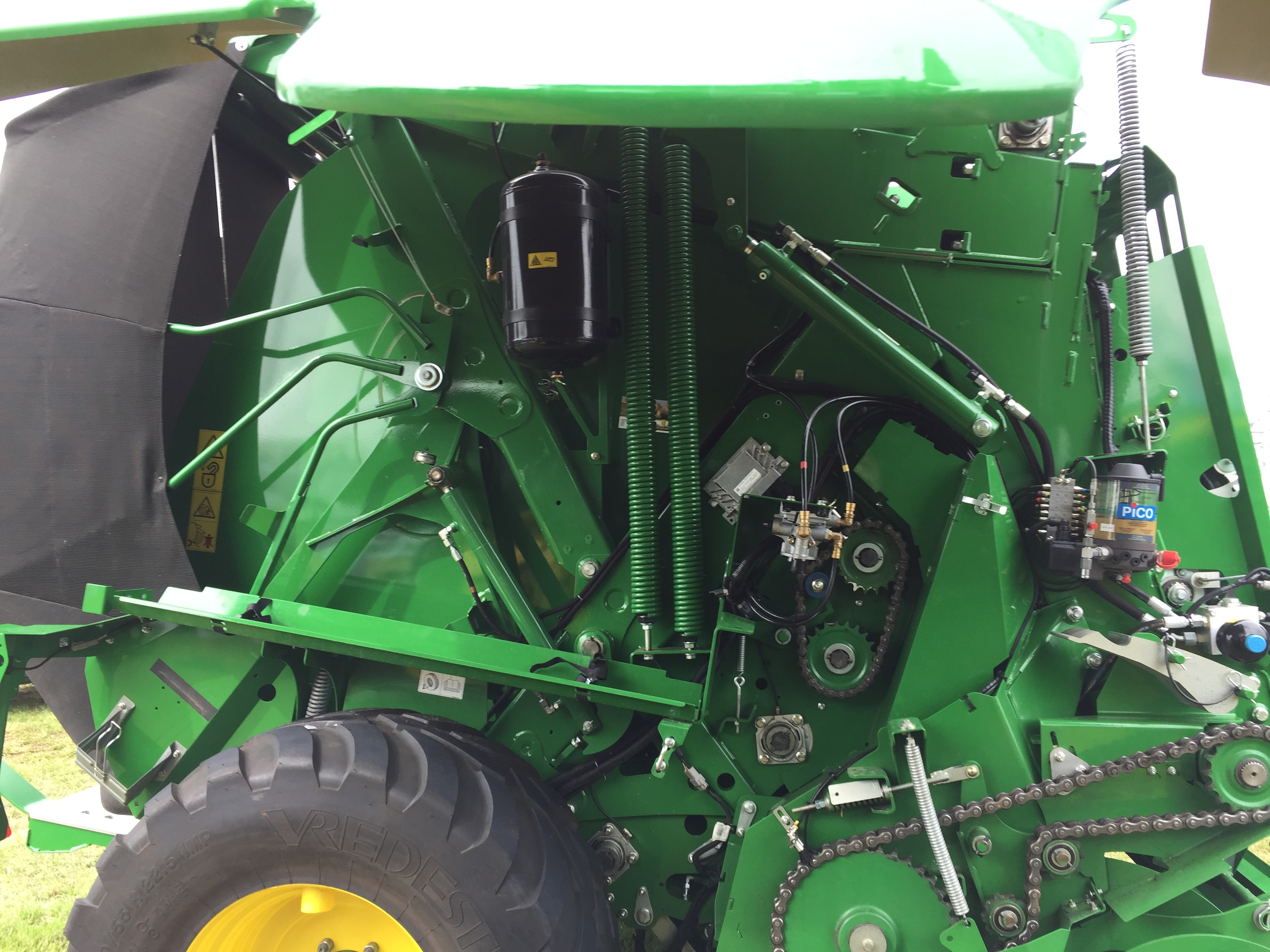 John Deere - Ballenpresse Detailansicht